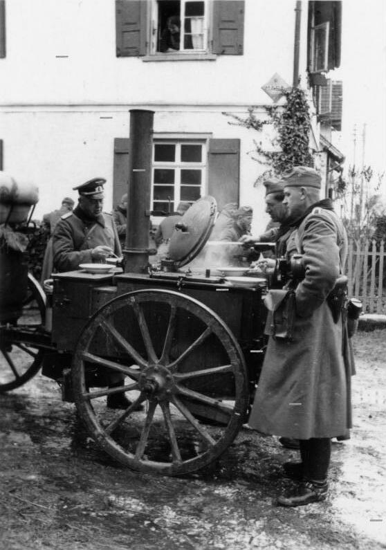 Hayingen, Soldaten an Feldküche Mittagsrast in Hayingen, Major Orth, Uffz. Oppermann, Koch Schöpperle [Album zur Landwehr-Artillerie-Abteilung 14 (Ldw.Art.Abt. 14).- Soldaten neben Feldkochherd (FKH, "Gulaschkanone")]